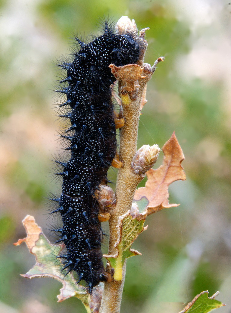 Euphydryas Aurinia en estado larvario